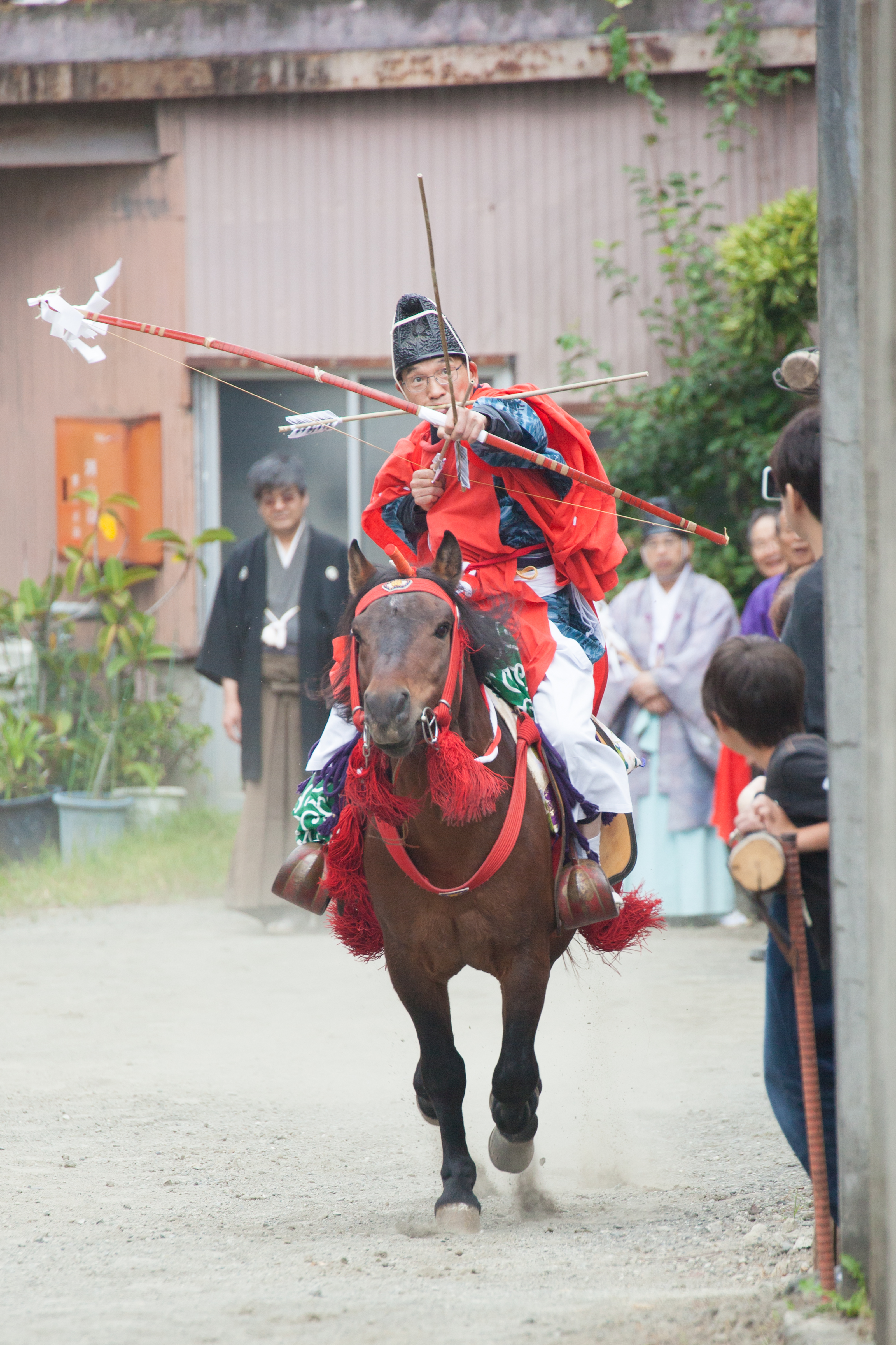 夕馬疾走（2014.9.19）普通の流鏑馬と違い独特であることが解る